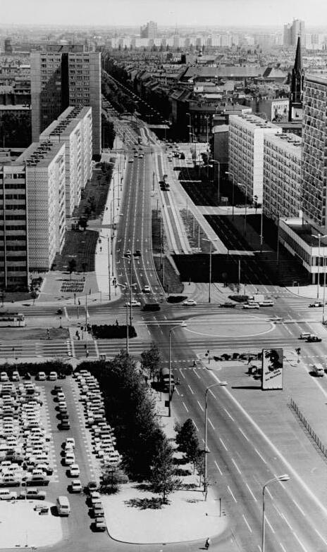 Berlin, Hans-Beimler-Straße ADN-ZB Sturm 21.6.77 Berlin: Blick auf die Hans-Beimler-Strasse und die Greifswalder Straße. Im Hintergrund sieht man das Neubaugebiet Greifswalder Straße. Information added by Wikimedia users.Bilck durch die heutige Otto-Braun-Straße. Die Wohnhäuser links und rechts sind vom Plattenbautyp P2. Das Hochhaus im Hintergrund links ist vom Typ WHH-GT 18 (Straße: Prenzlauer Berg 17/18). Das Hochhaus von rechts im Bild ist eine Sonderentwicklung des Plattenbaus, die Wohnungen wurden mit variablen Wänden gebaut. Das Haus wurde abgerissen, an seiner Stelle steht heute das Hochhaus der Mercedes Benz Bank.